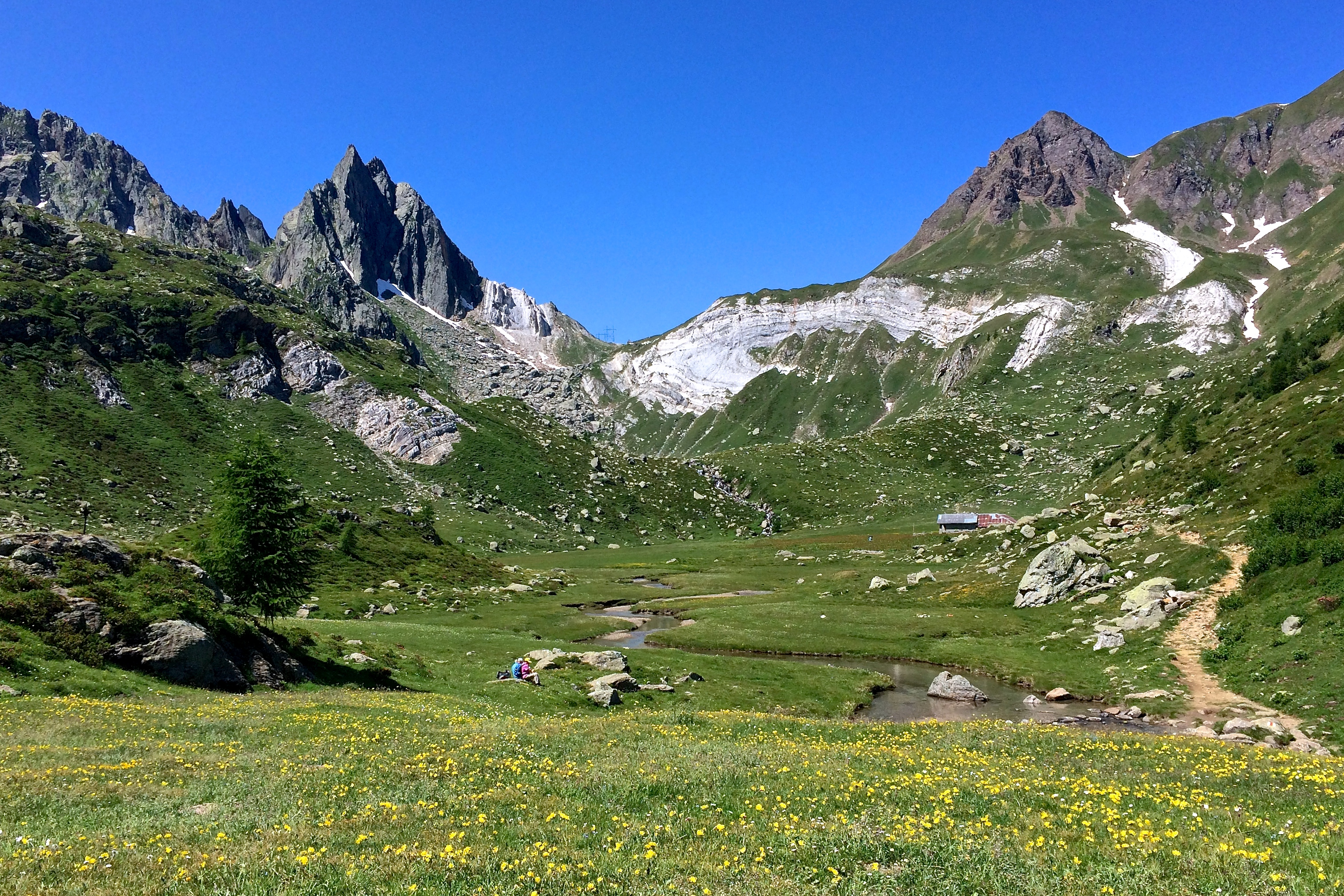 Alpe Campolungo Ticino Svizzera